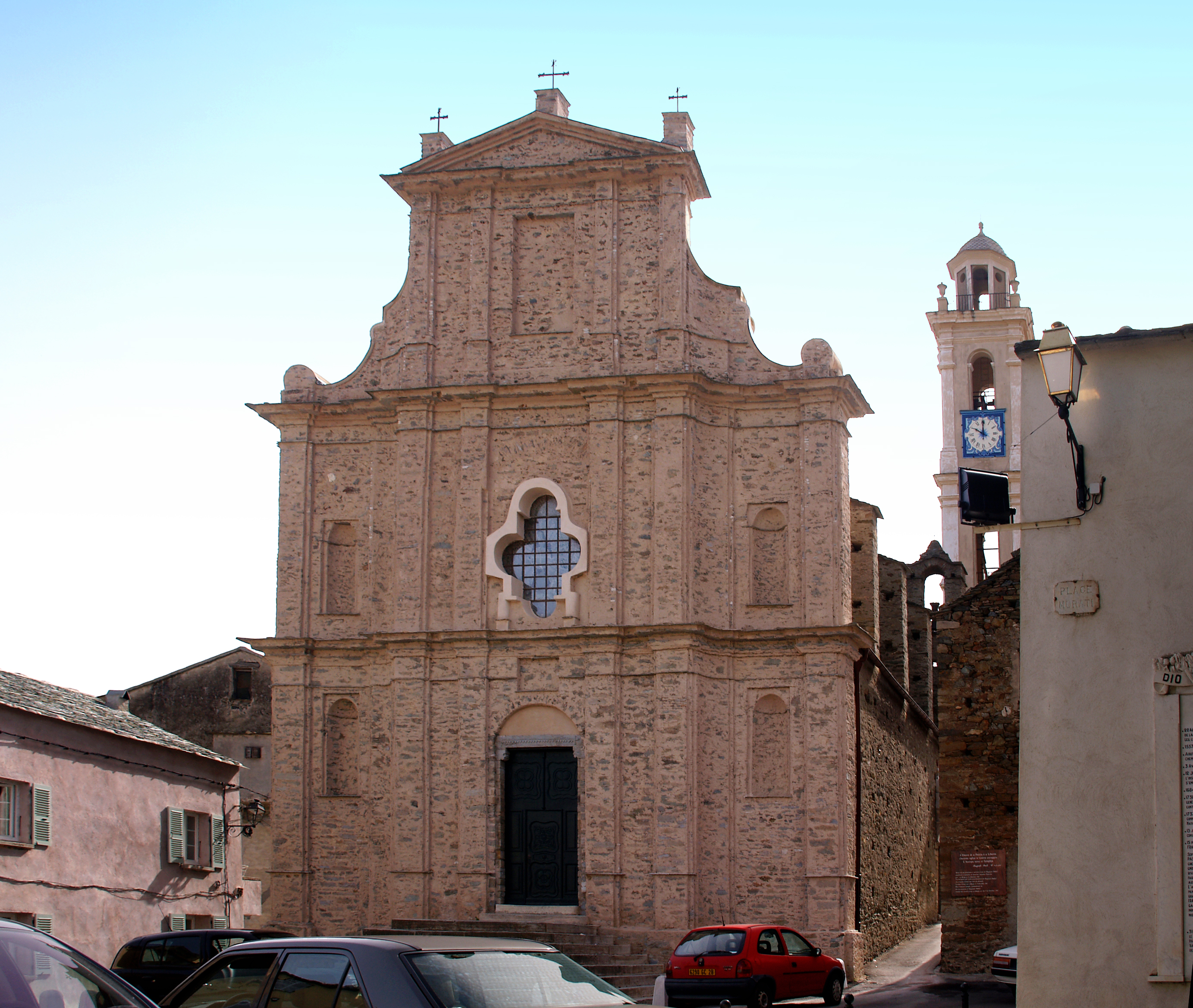 Borgo (Corse) - Église de l'Annonciation